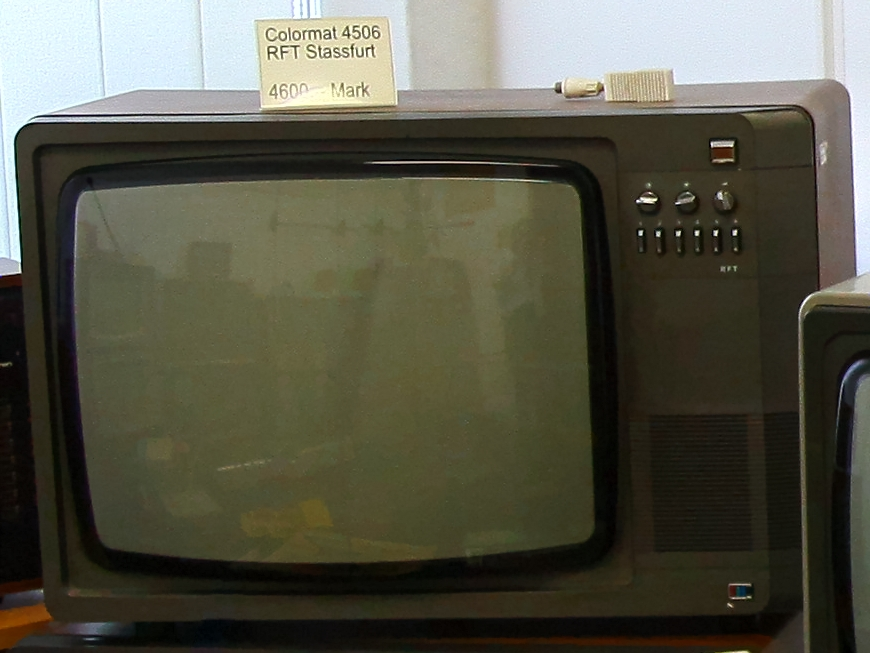 DDR-Museum Zeitreise in Radebeul 2012 - Fernsehgerät "Colormat 4506" vom VEB RFT Staßfurt - Neupreis: 4.600 DDR-Mark